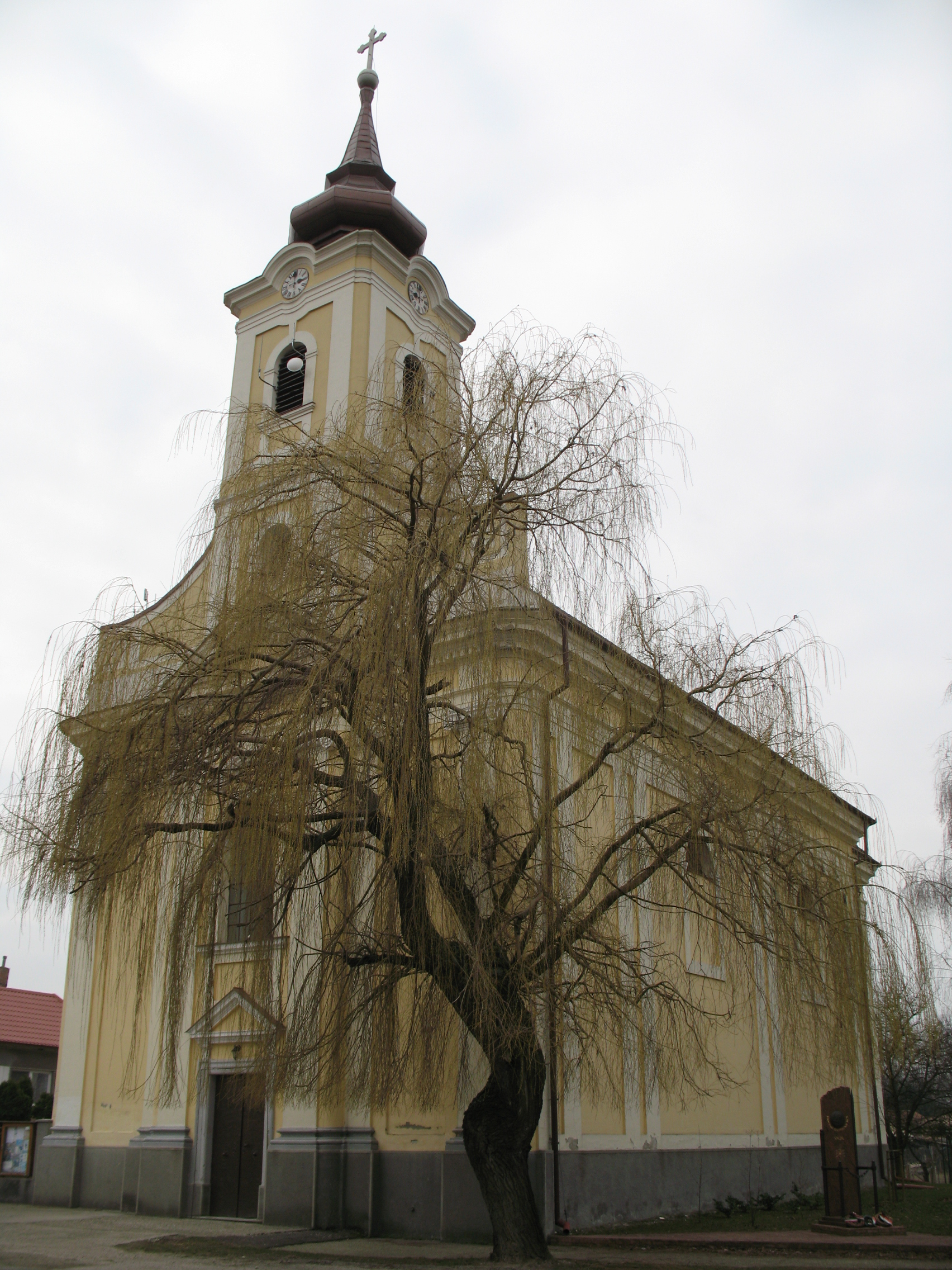 Vajka